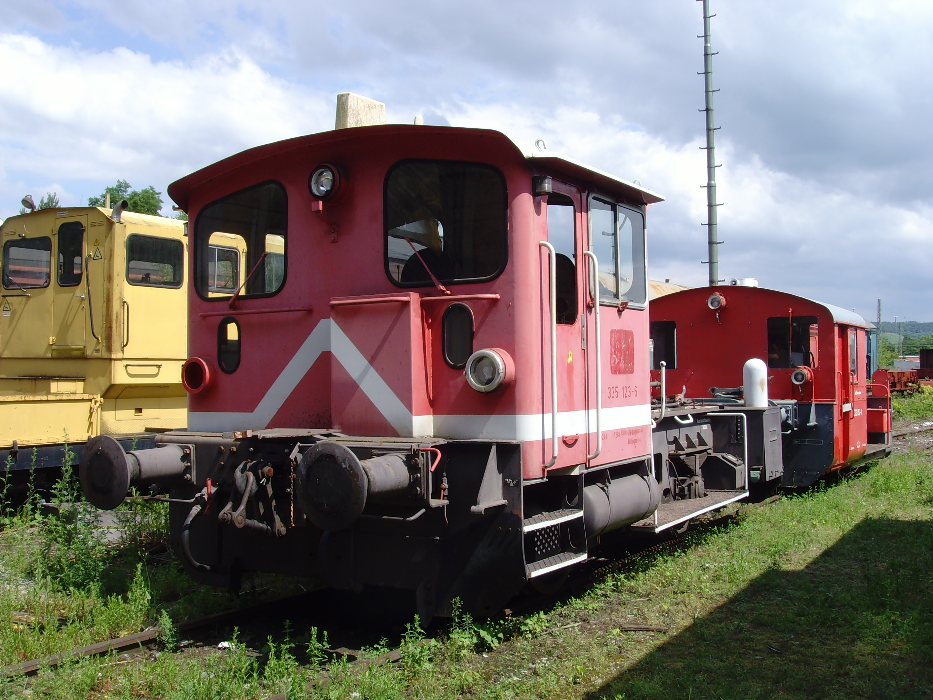 Süddeutsches Eisenbahnmuseum Heilbronn - Schnellzugloktreffen 092